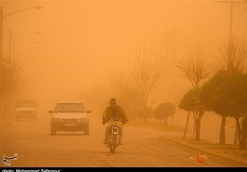 حرکت موتورسوار در گرد و غبار طوفان ۱۳۹۷ سیستان و بلوچستان